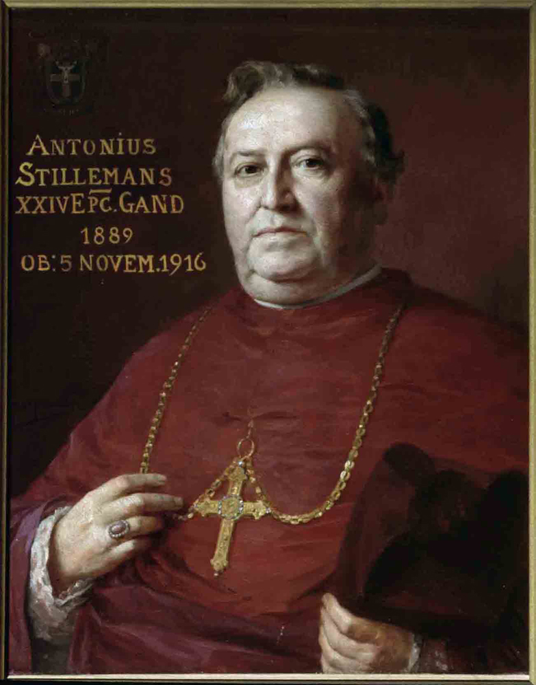 Sint-Baafskathedraal, Gent Portret van Mgr. Antonius Stillemans; inv nr: 499/24